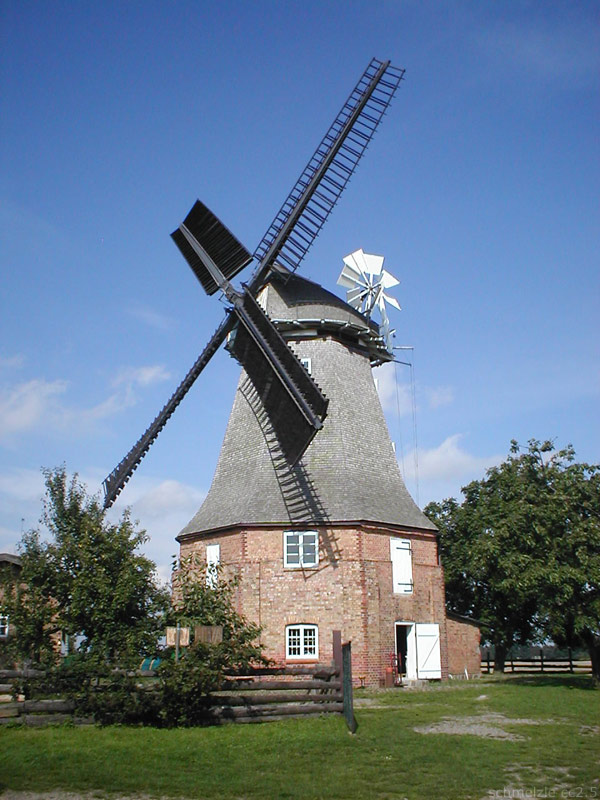 Windmühle in Altkalen, neu erbaut nach Brand des Vorgängerbauwerks 1913, umfassend saniert 1991-2002, einzige regelmäßig produzierende Windmühle in Mecklenburg-Vorpommern